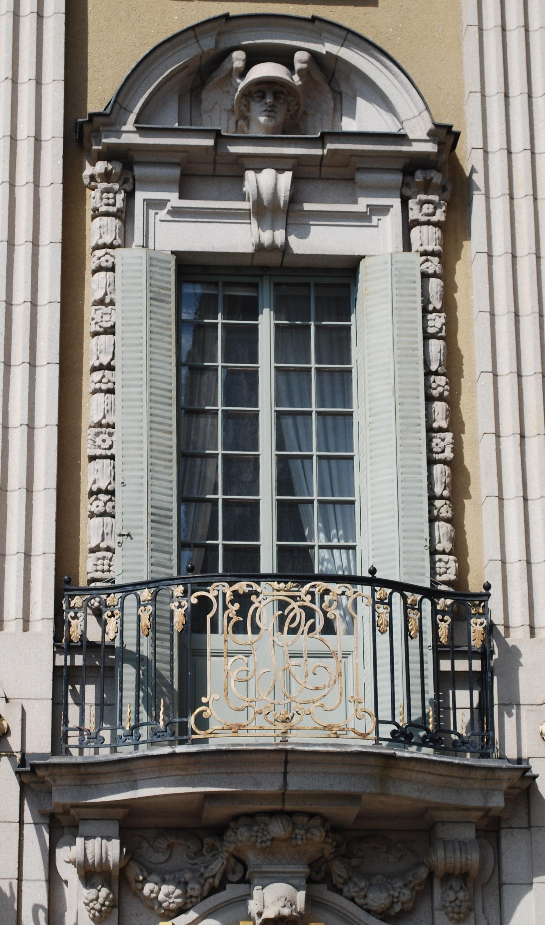 Balkongen ovanför entrén på Sveriges Privata Centralbank på Gustav Adolfs Torg i Stockholm.